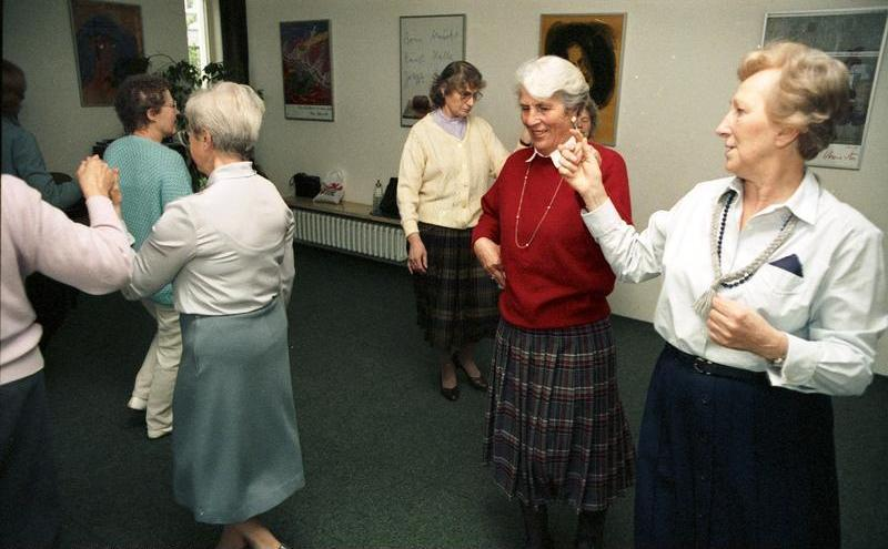 Altenbegegnungsstätte in Bonn-Bad Godesberg, Dürenstraße